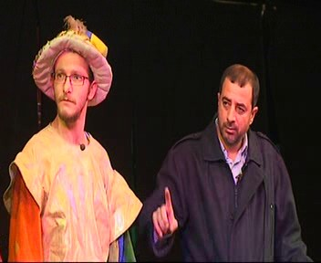 لقطة من مسرحية أمير الألحان